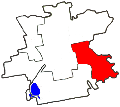 Грушевская сельская громада